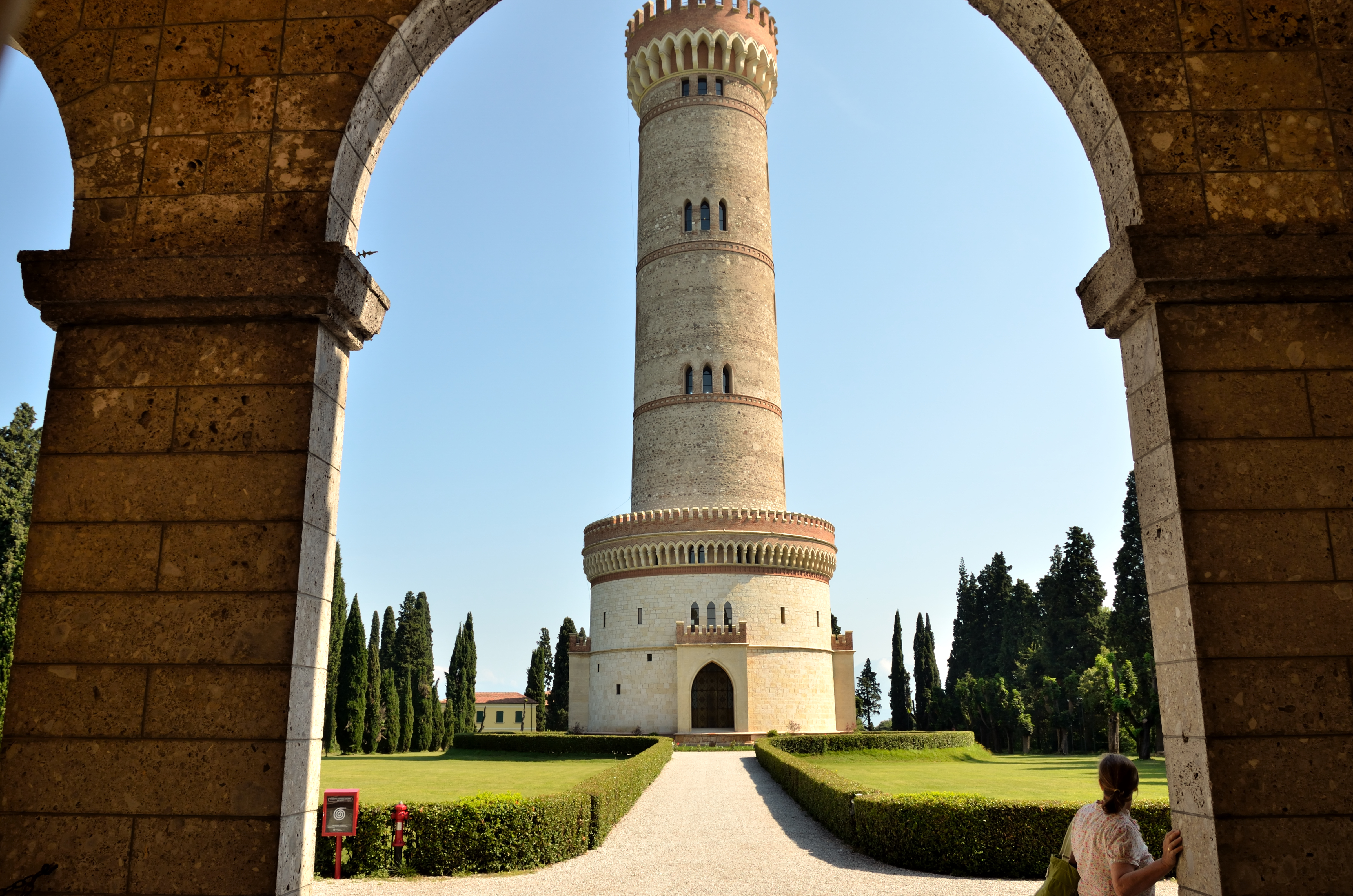 Torre commemorativa